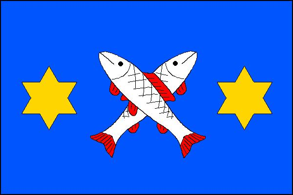 Vlajka obce Žatčany